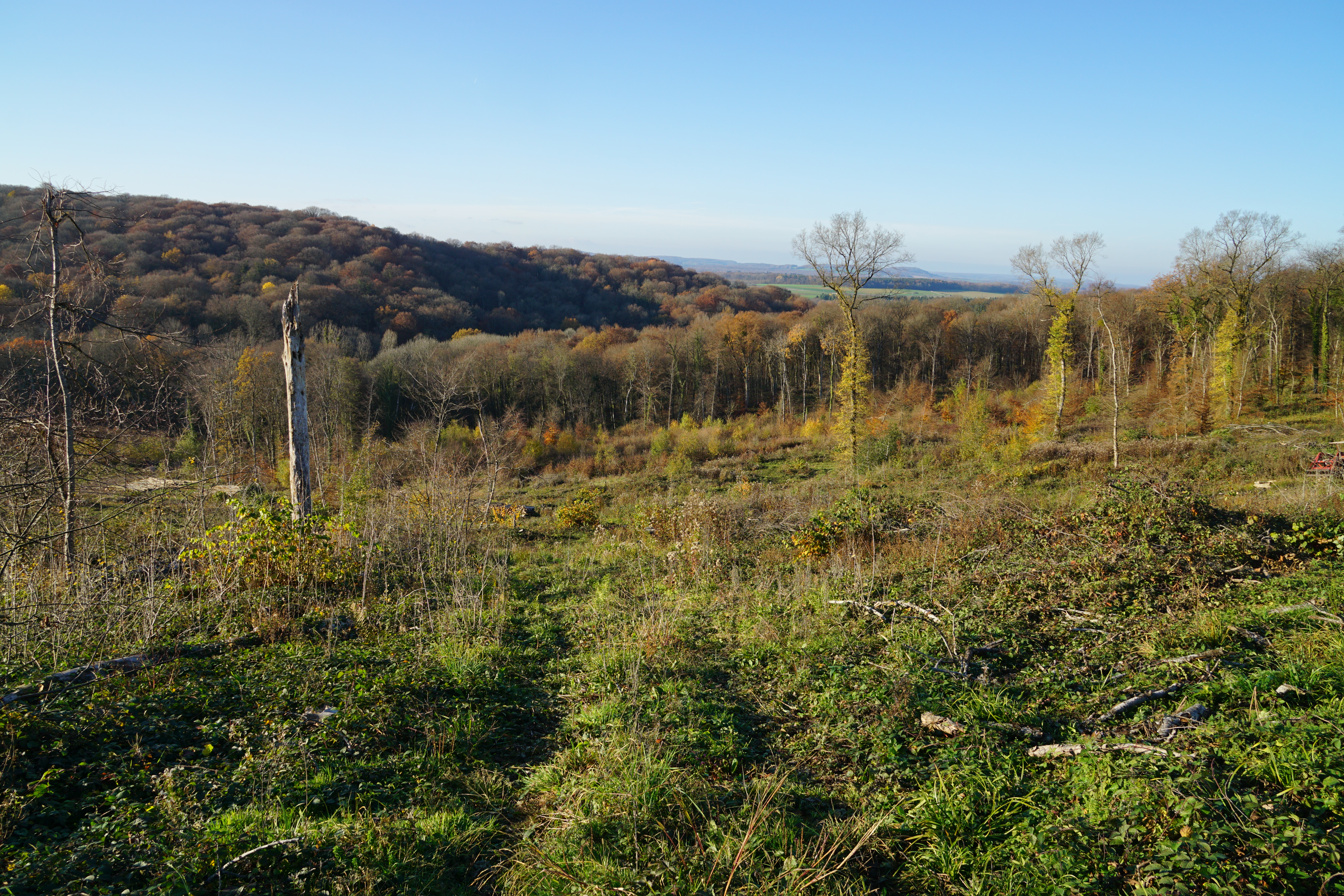 Dans cette partie défrichée du bois de Fallon se trouvent trois puits des Houillères de Mélecey.